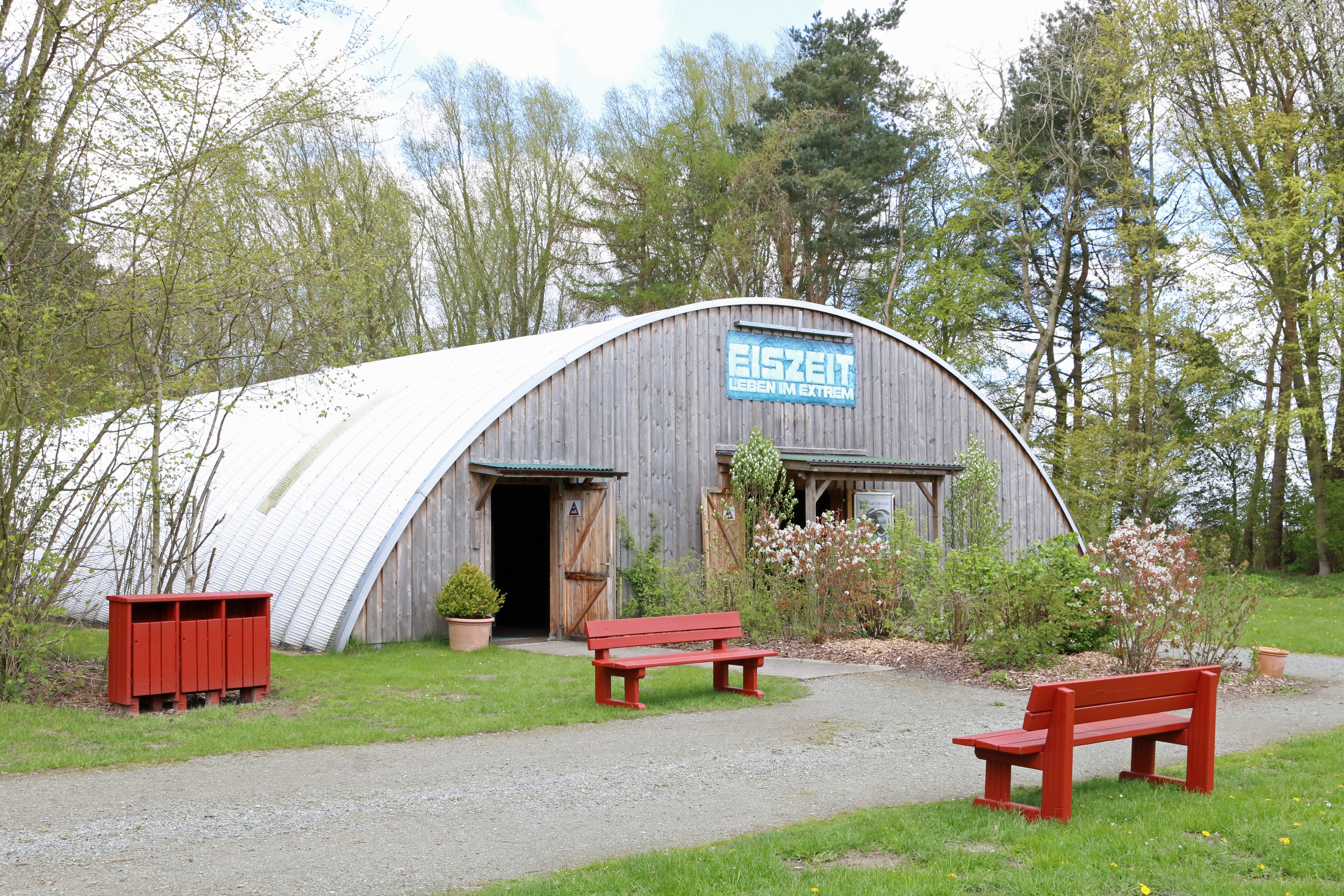 Halle für Sonderausstellungen im Natureum Niederelbe